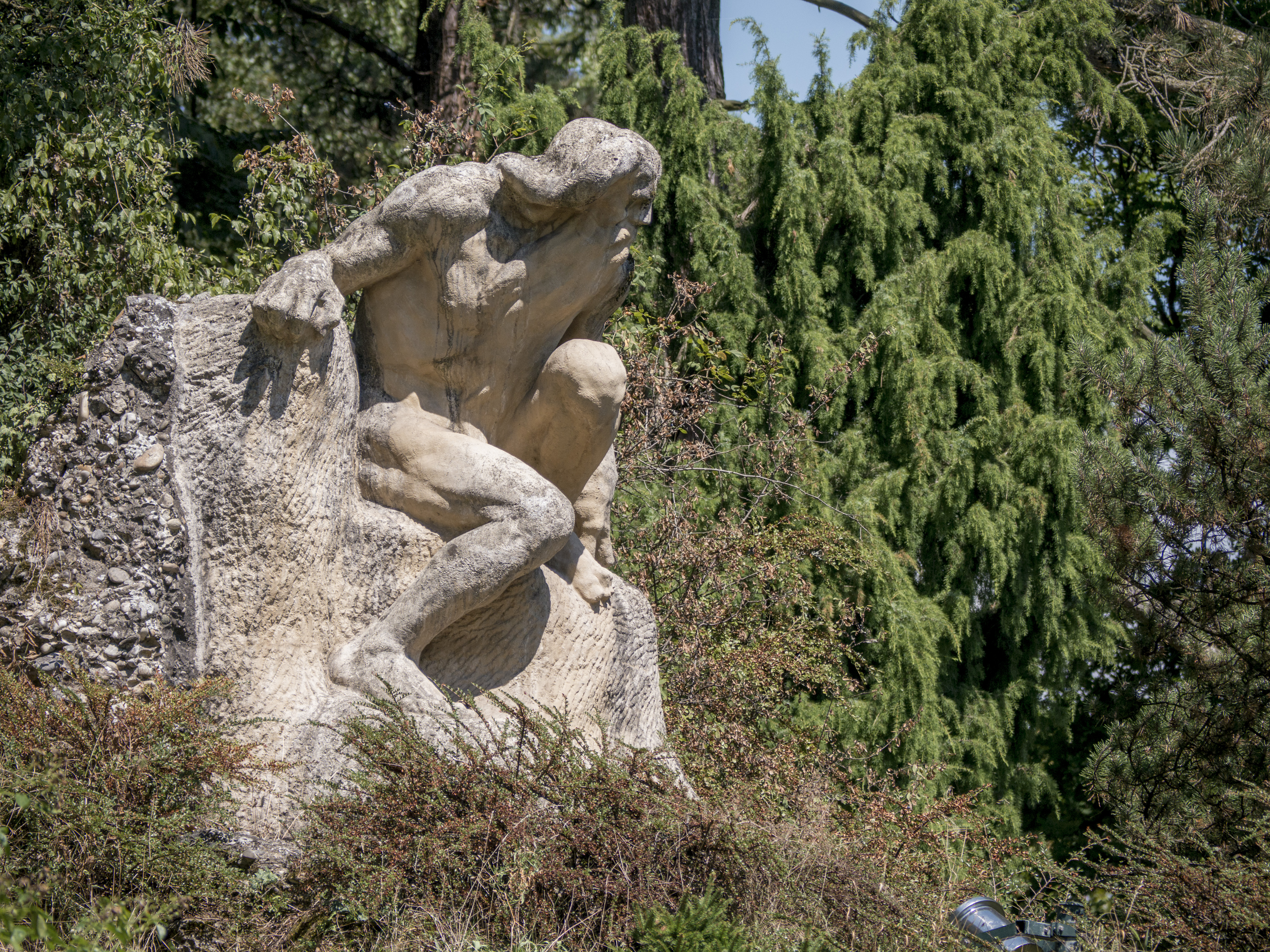 Bauernberganlagen 1912 der "Berggeist" von Adolf Wagner von der Mühl